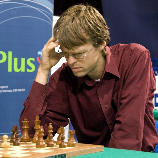 Sarunas Sulskis, Warsaw 2006